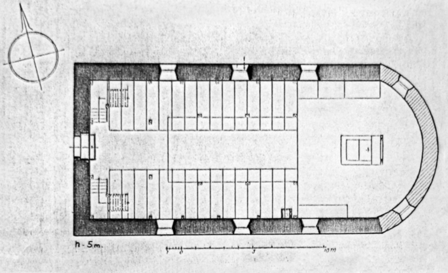 Kościół w Wojcieszycach. Rzut przyziemia (stan przed rokiem 1946)